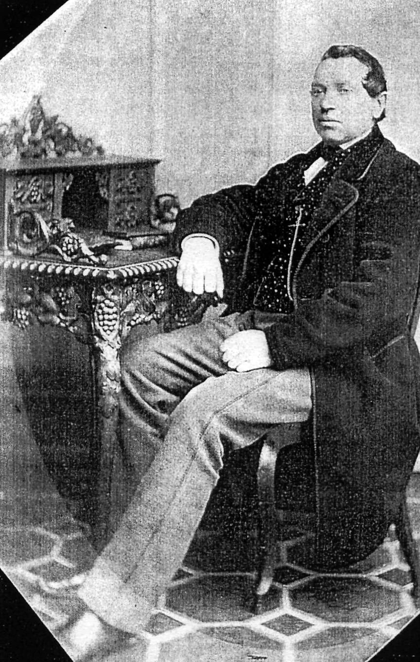 Lechenich, Oebelsmühle. Theodor Oebel